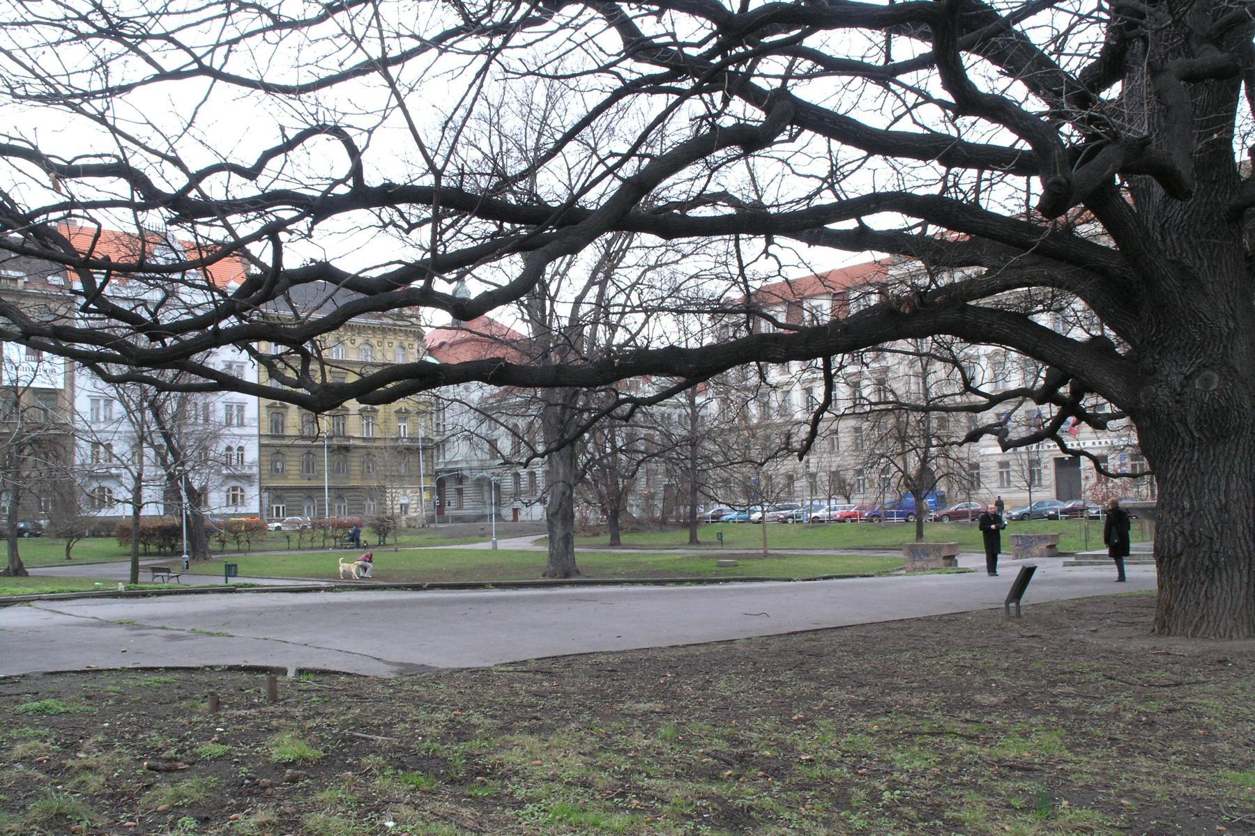 Dienzenhoferovy sady (Praha, Smíchov)